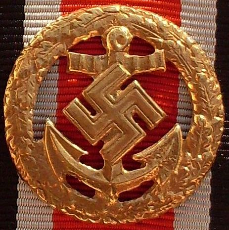 Ehrenblattspange der Kriegsmarine (links 57er Version, rechts stiftungsmäßige Ausführung)